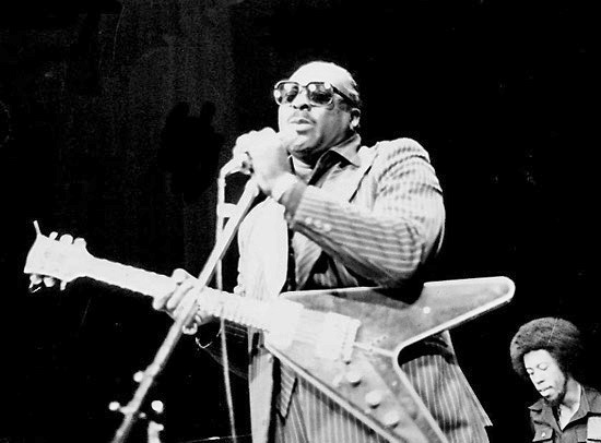 da